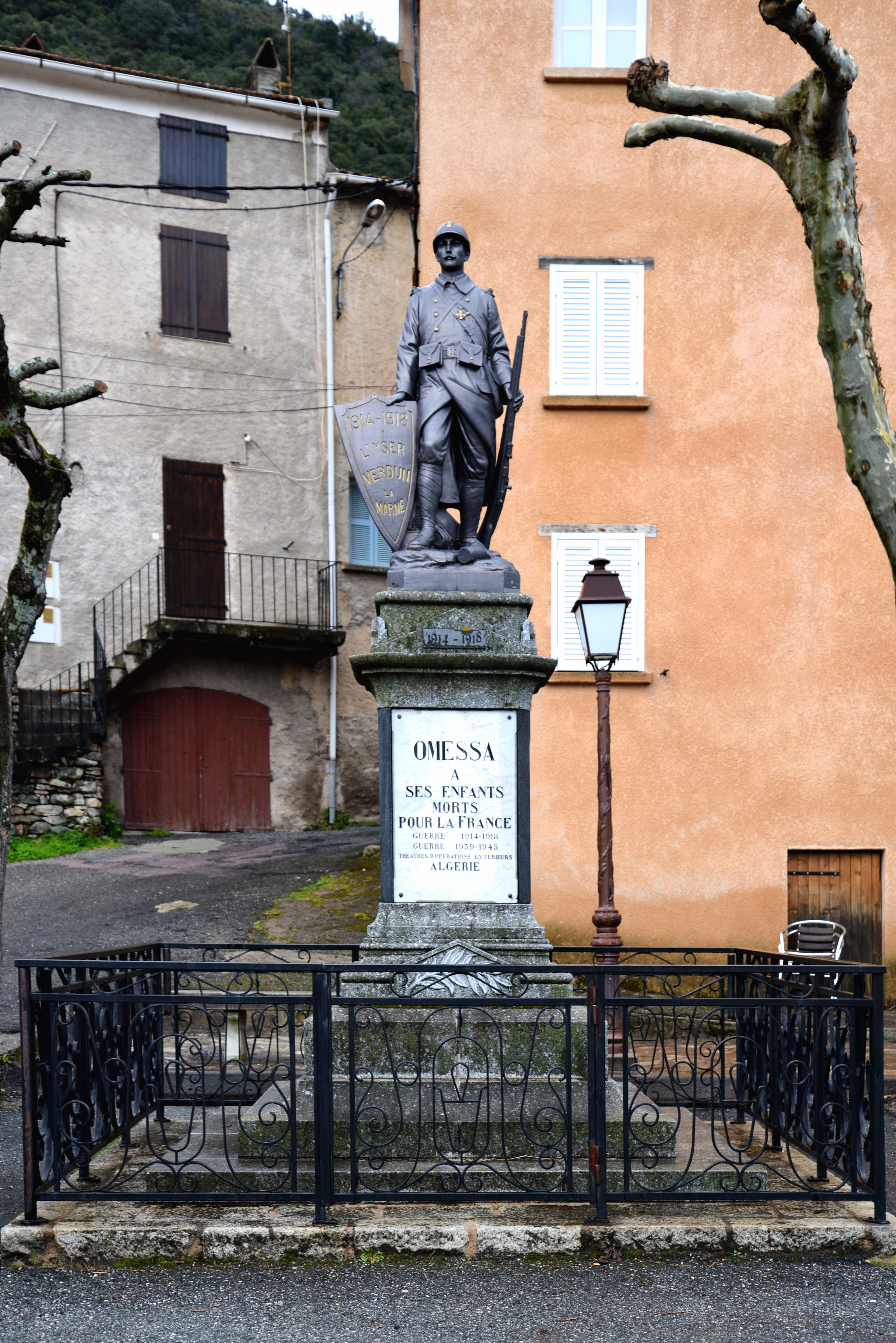 Omessa, Castagniccia (Corse) - Monument aux morts